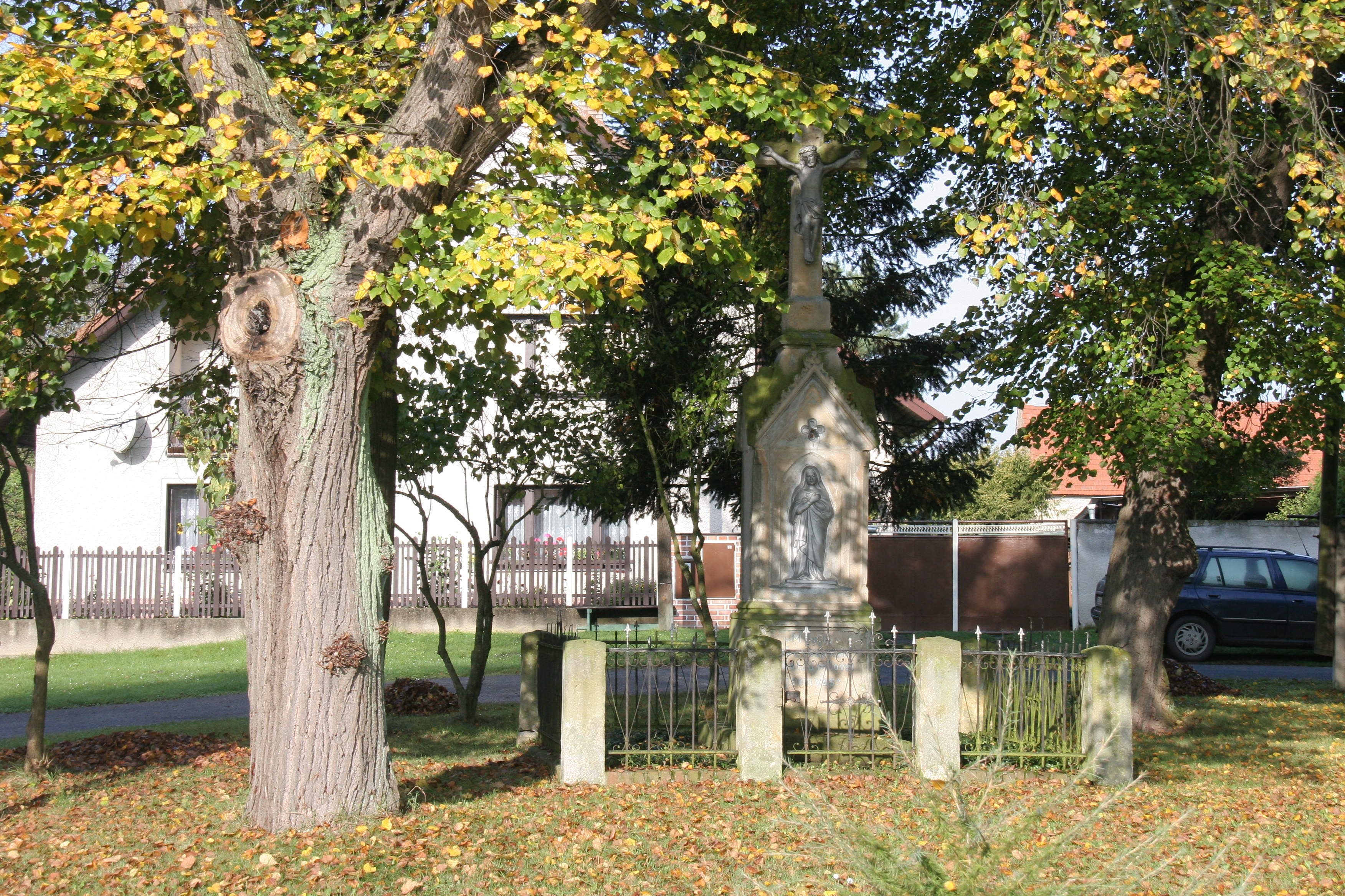 Loukonosy kříž